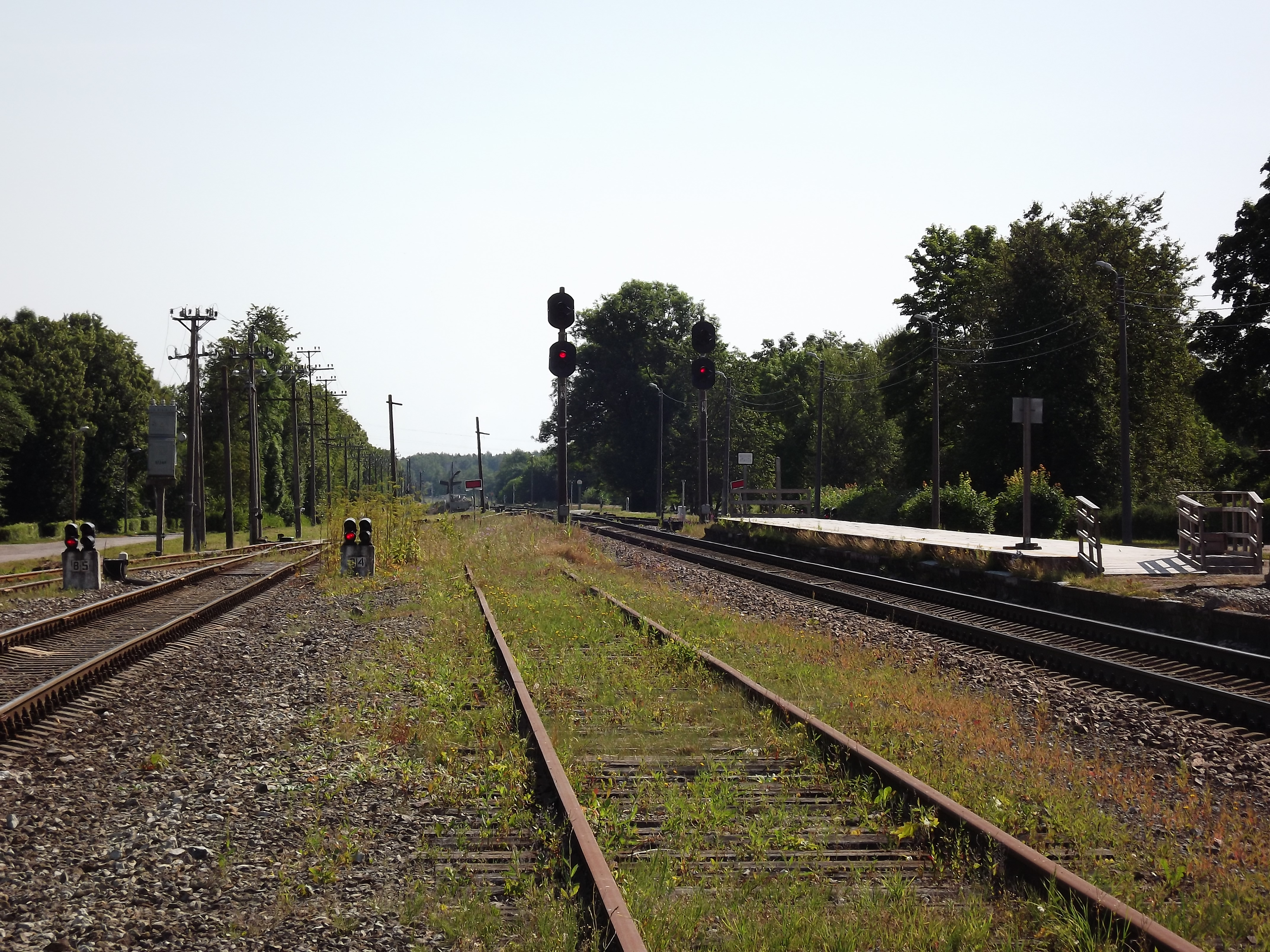 Kiviõli raudteejaam.